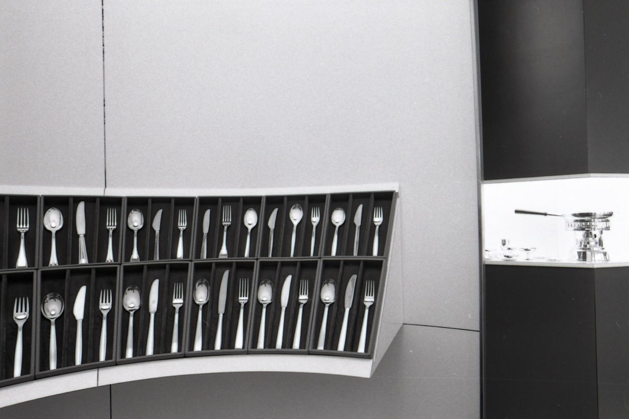 Milano. Corso Sempione n. 38. Negozio (showroom) architetto Roberto Sambonet: mobili, posate e servizi da tavola in esposizione Servizio fotografico : Milano, 1973 / Paolo Monti. - Strisce: 3, Fotogrammi complessivi: 17 : Negativo b/n, gelatina bromuro d'argento/ pellicola ; 35 mm. - ((Sul portanegativi: NIKMAT FP4. - Fonte: Agenda di Paolo Monti: Leica 1501-3000 Controllo numerazione (1950-1978), presso Archivio Paolo Monti